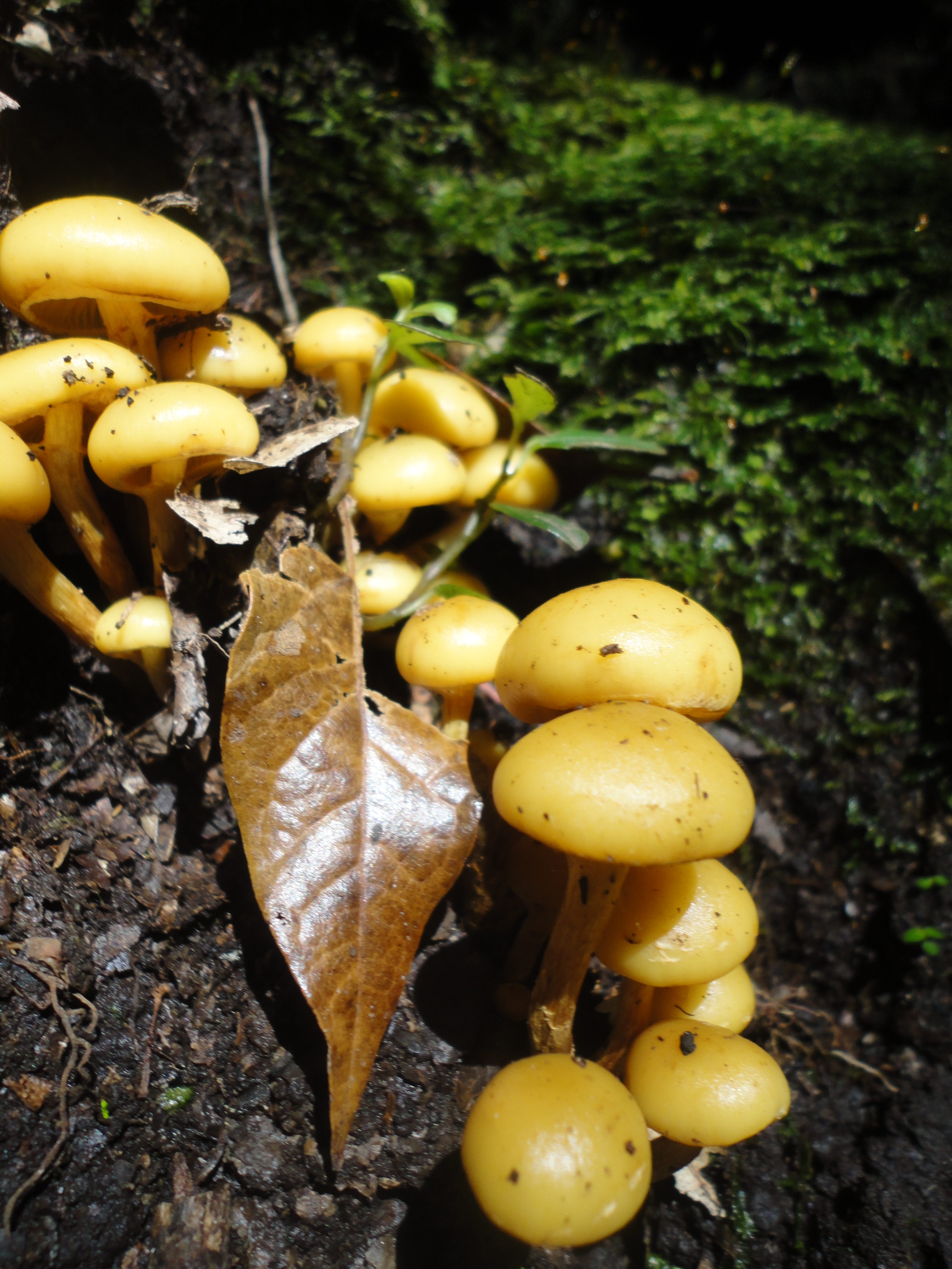 Hongos del interior del cerro el pital, Chalatenango, San Ignacio.